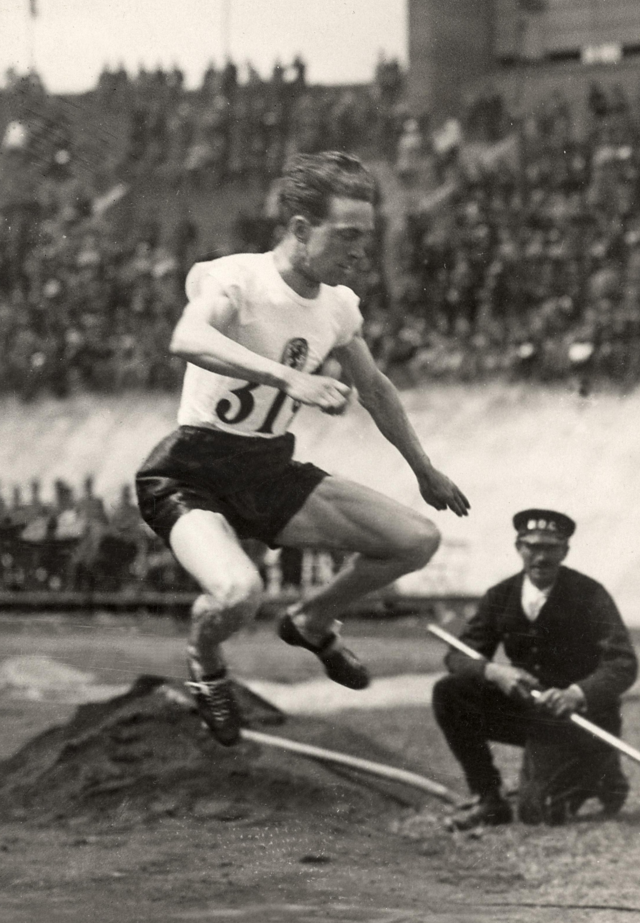 Sport, Olympische Spelen Amsterdam, 1928 : De Nederlandse athleet S. van Musscher in actie tijdens de hink-stap-sprong.